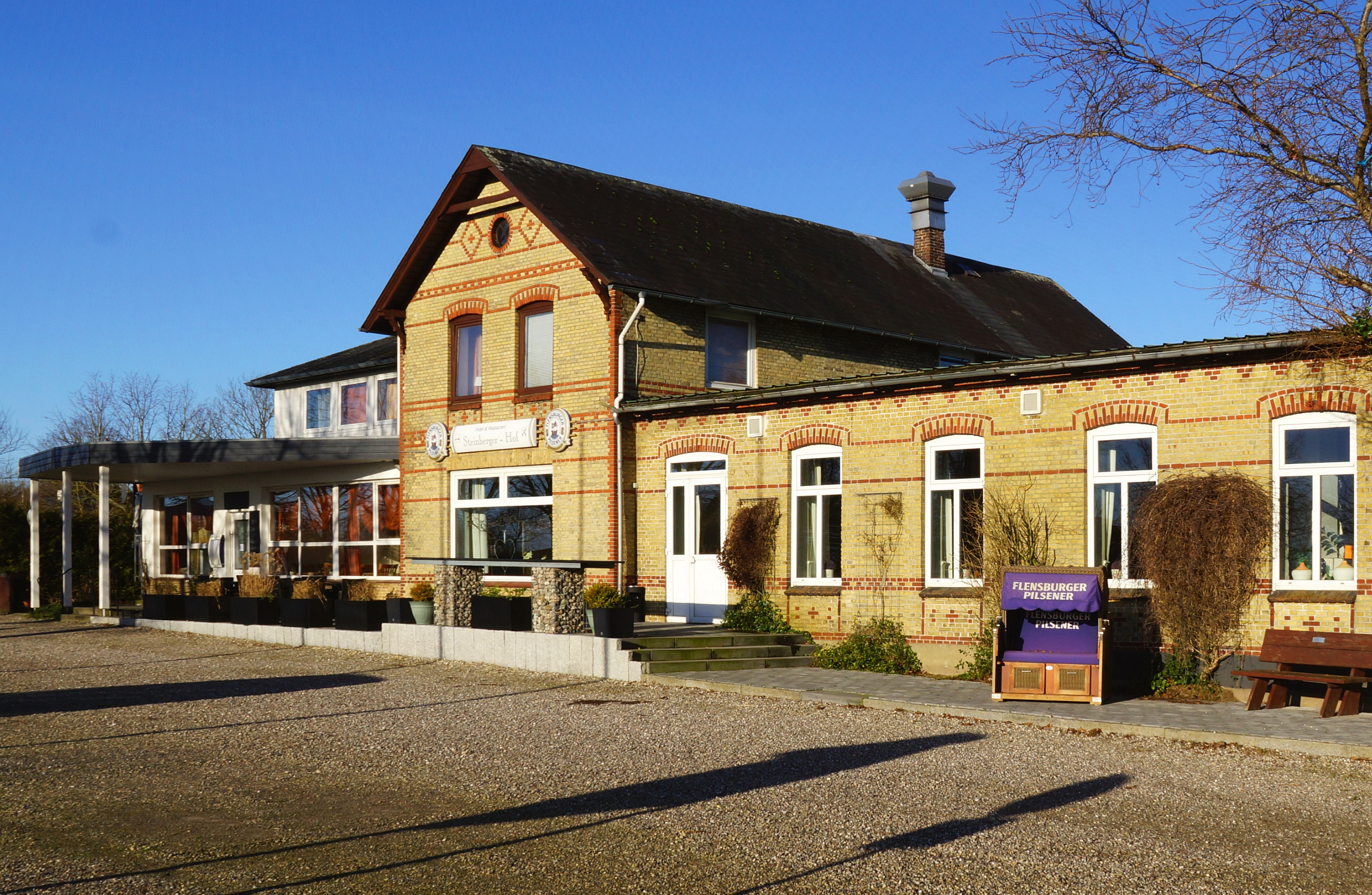 Alter (früherer) Bahnhof in Steinberg der ehemaligen Flensburger Kreisbahn - heute Gastgewerbebetrieb - Foto Wolfgang Pehlemann DSC6809